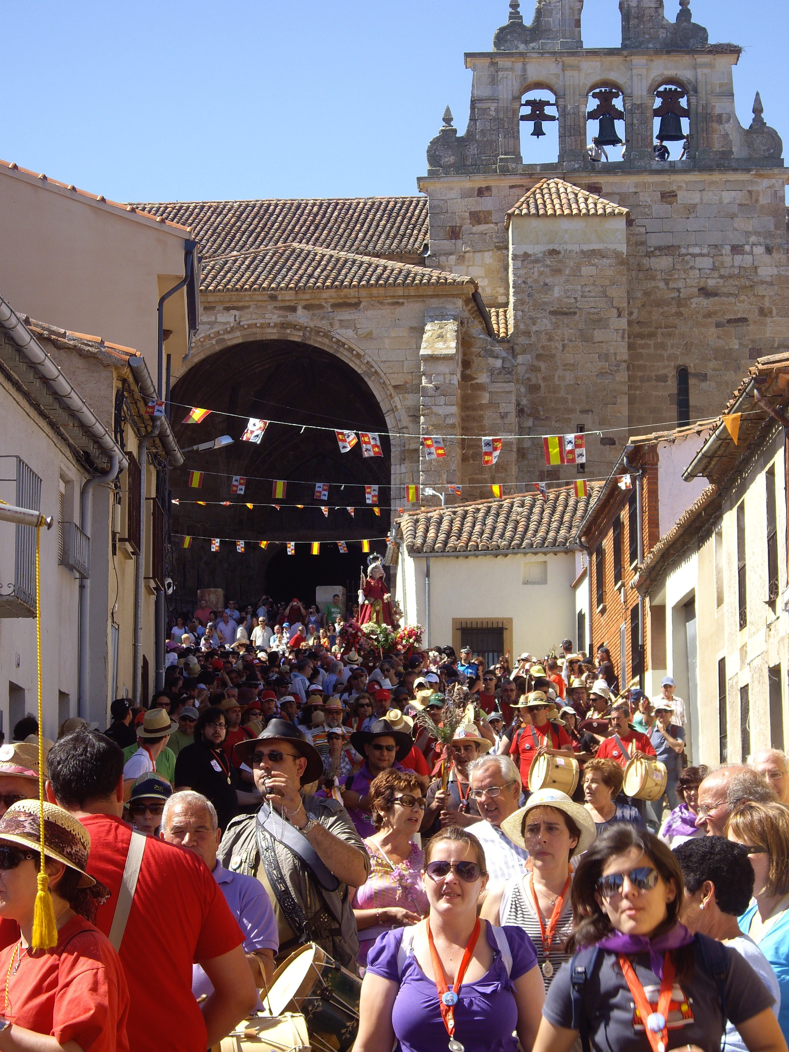 Romeria de La Hiniesta saliendo hacia Zamora.